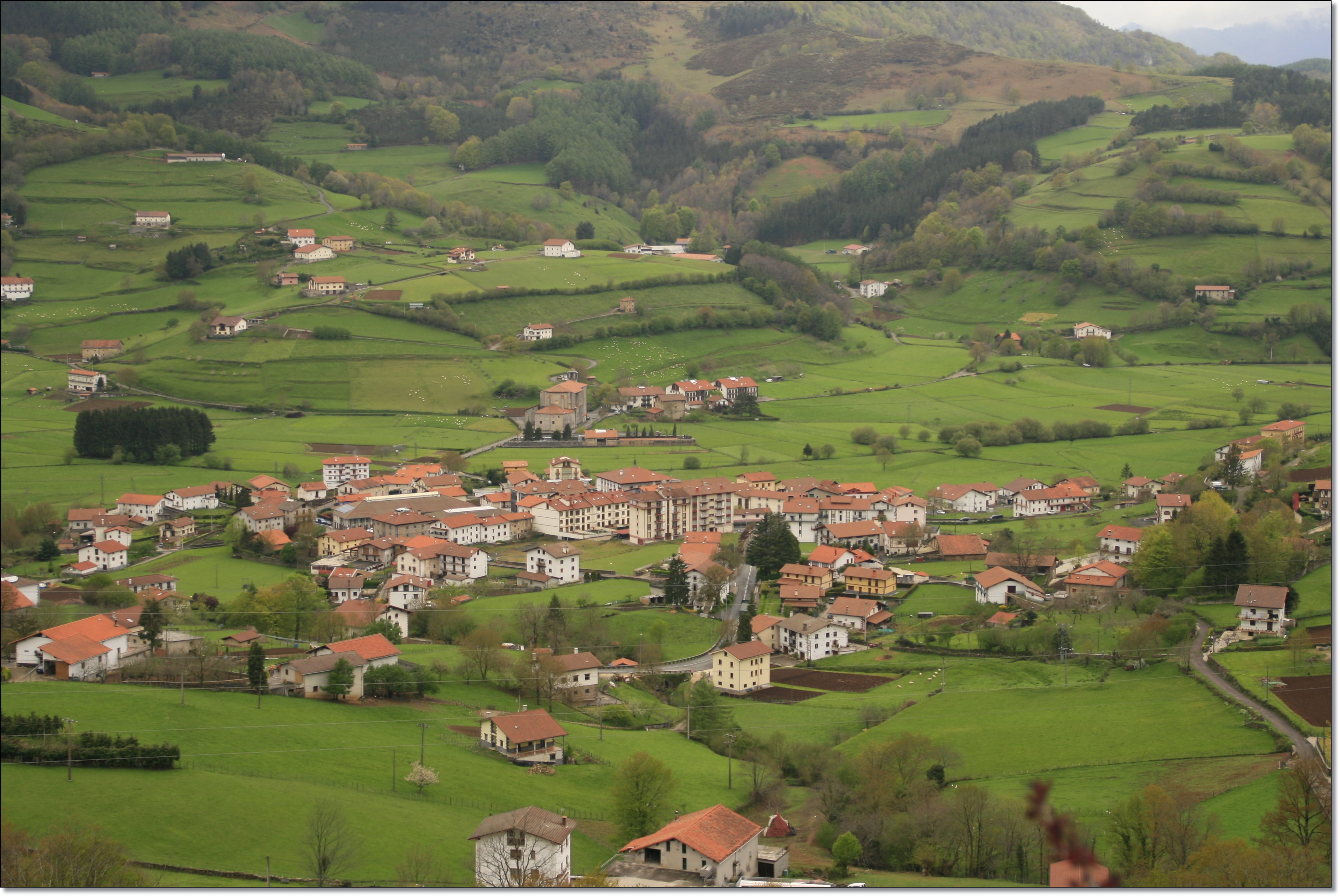 Berastegi, Guipúzcoa.